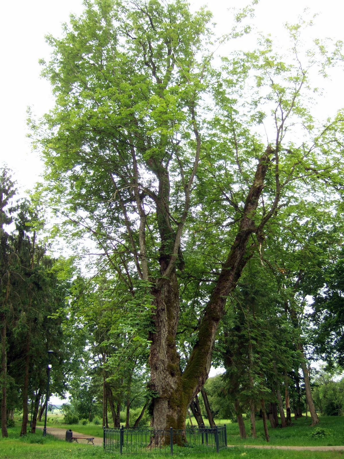 Salantų parko kaštonas, storiausias kaštonas Lietuvoje